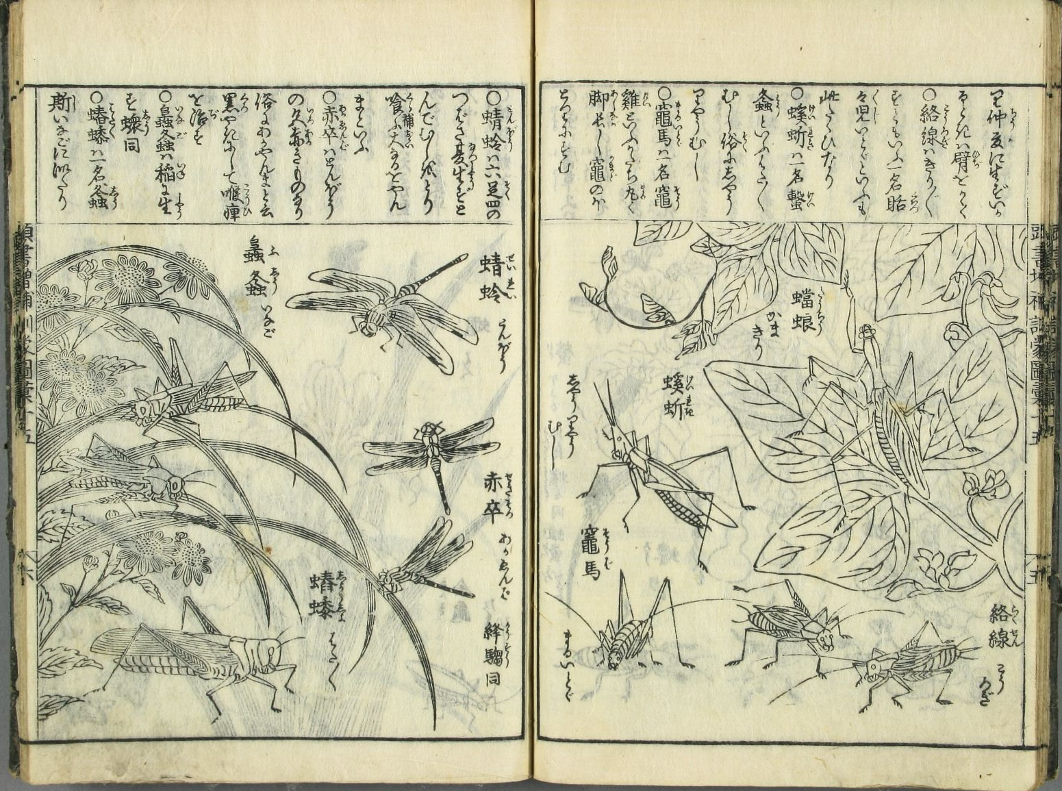 中村惕斎『訓蒙図彙』巻七 二〇頁